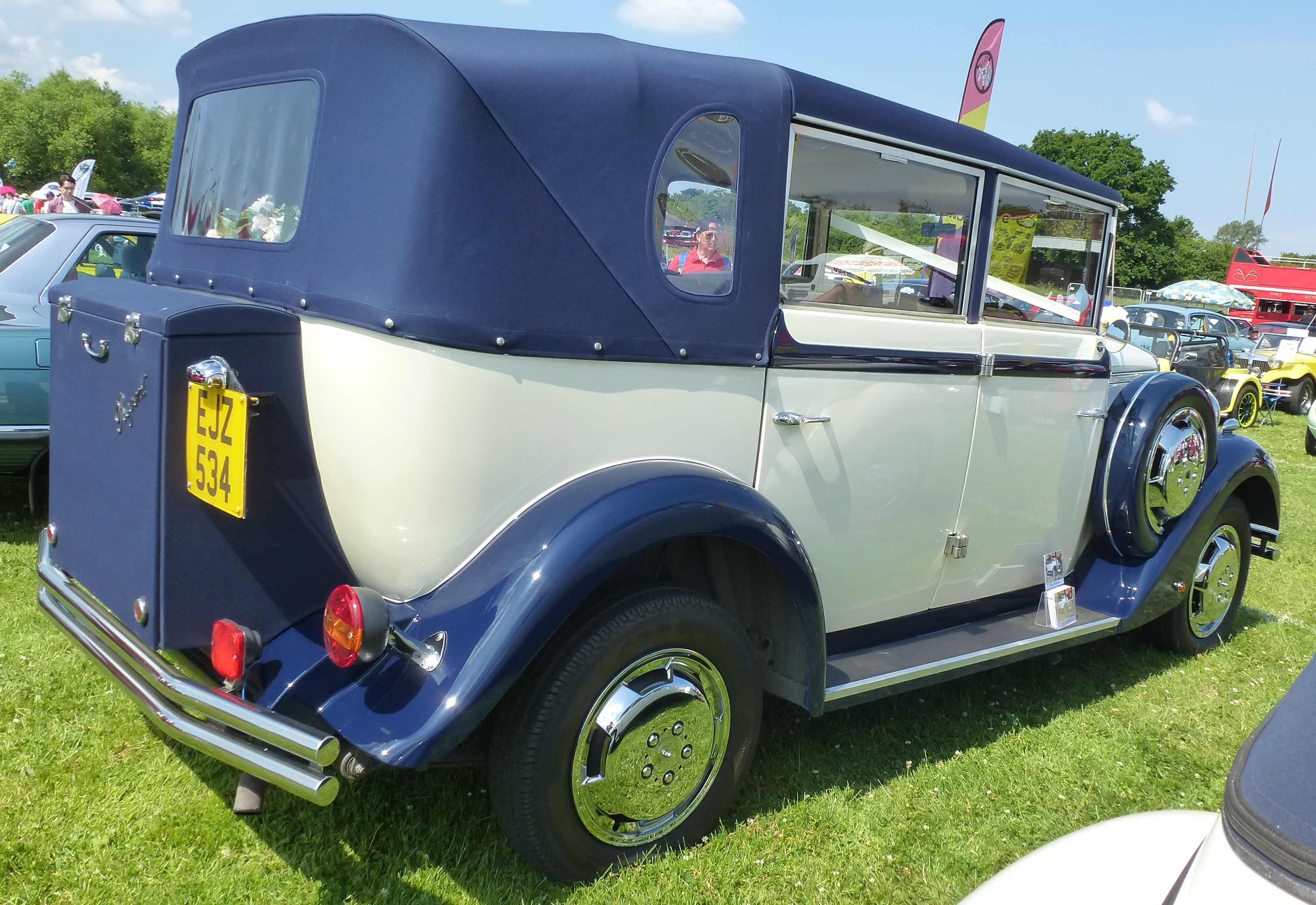 Regent Landaulet 1991